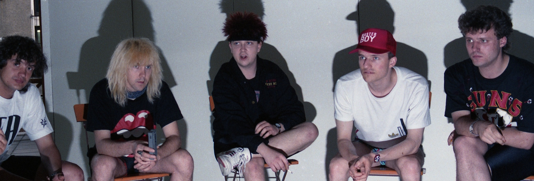 Die Prinzen im Interview vor einem Konzert in Magdeburg am 05.06.1992